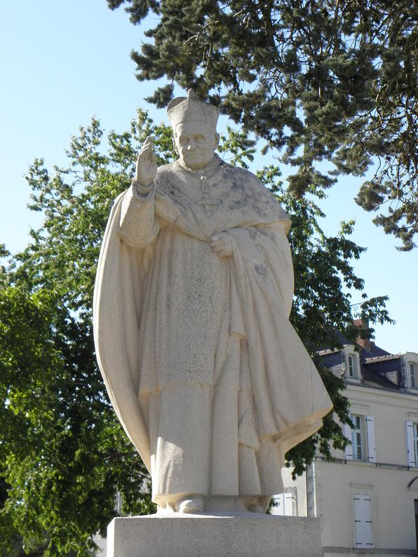 Statue du cardinal Suhard à Brains-sur-les-Marches (53).